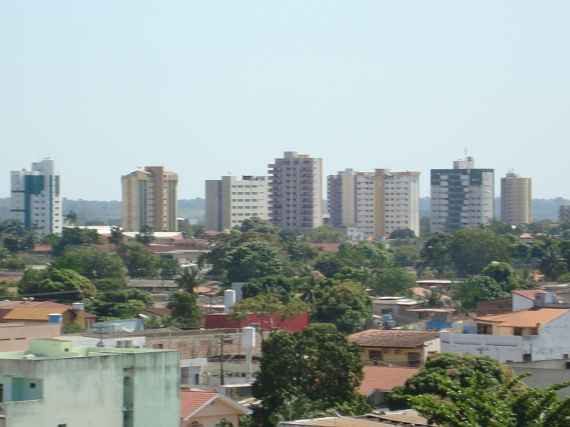 Skyline do Bairro Olaria, Porto Velho, Rondônia.